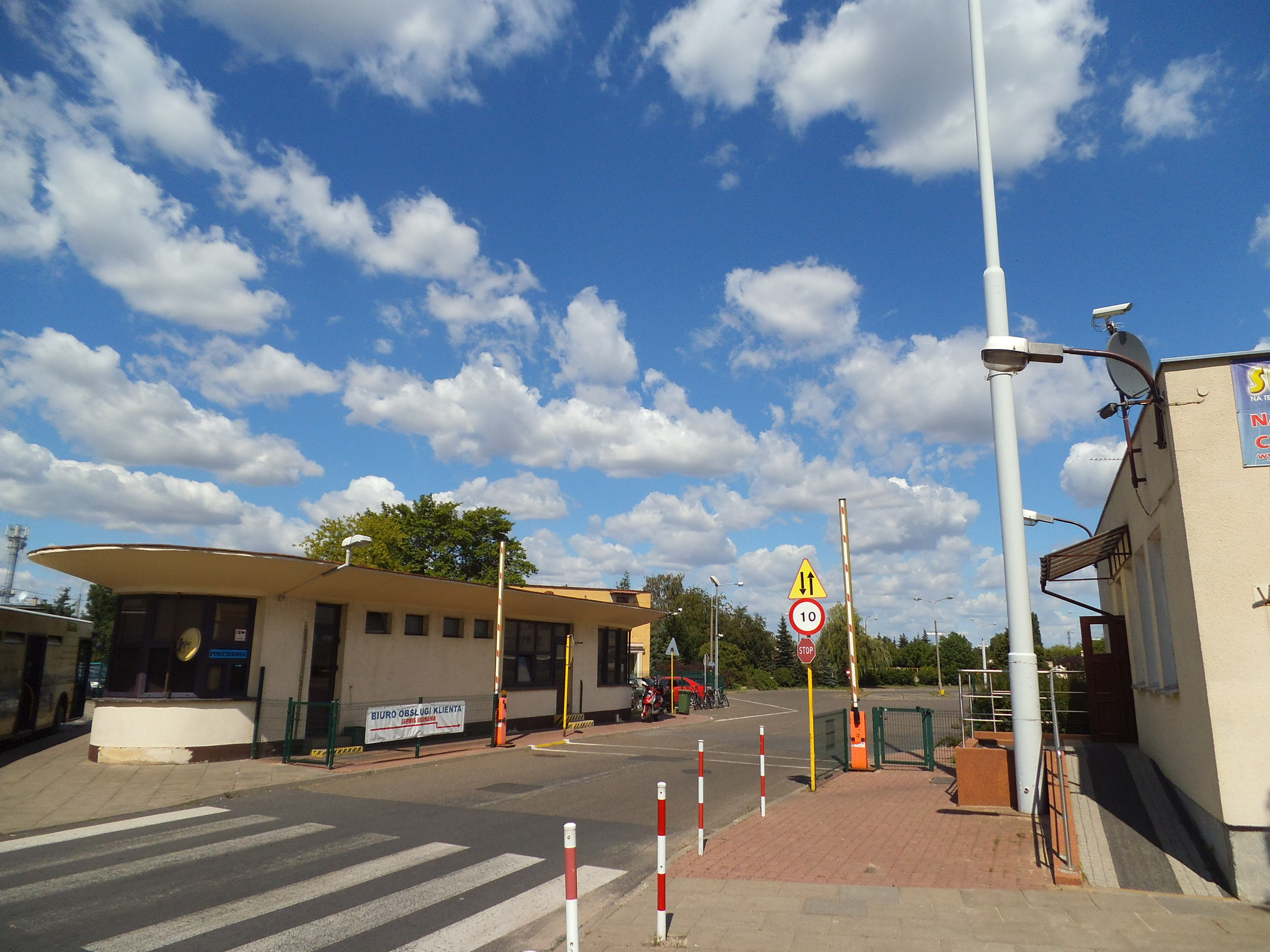 Zajezdnia autobusowa w Toruniu